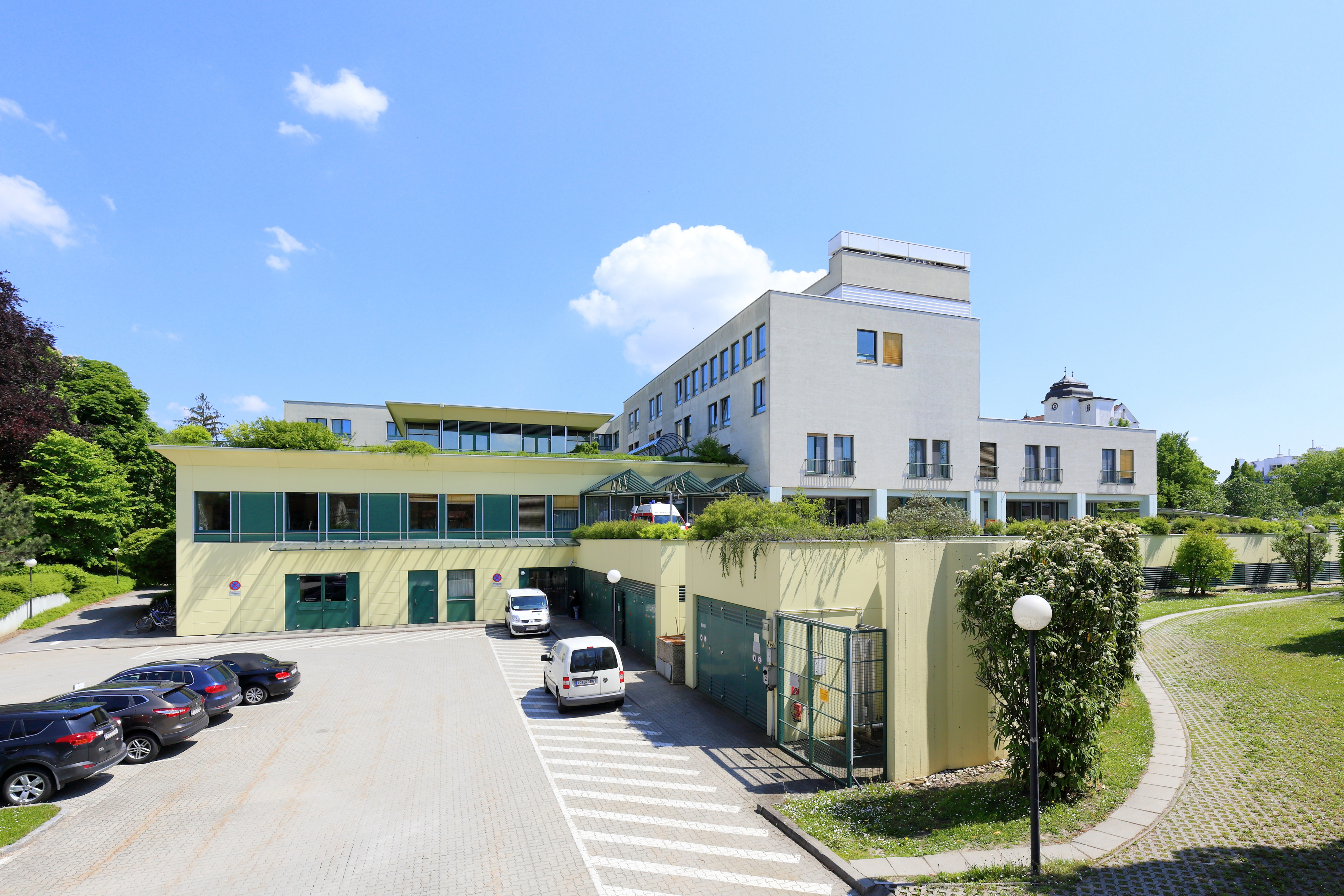 Westansicht des Landesklinikum in der niederösterreichischen Stadt Stockerau.Das mit einem Kostenaufwand von rund 420 Mio. Schilling errichtete Krankenhaus wurde im Februar 1991 in Betrieb genommen. Das auf dem gleichen Areal liegende alte Krankenhaus wurde im Anschluß zu einem Pflegheim aus- und umgebaut und im Jänner 1995 eröffnet.